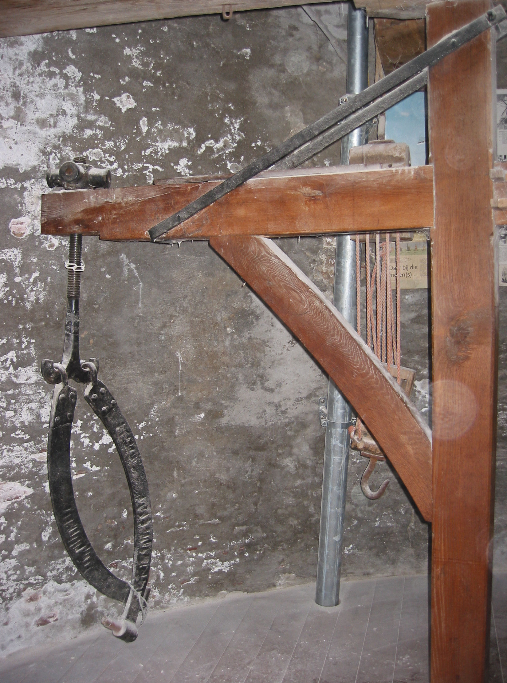 De Hoop in Garderen, Gelderland, the Netherlands